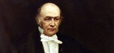 รูปฮามิลตัน